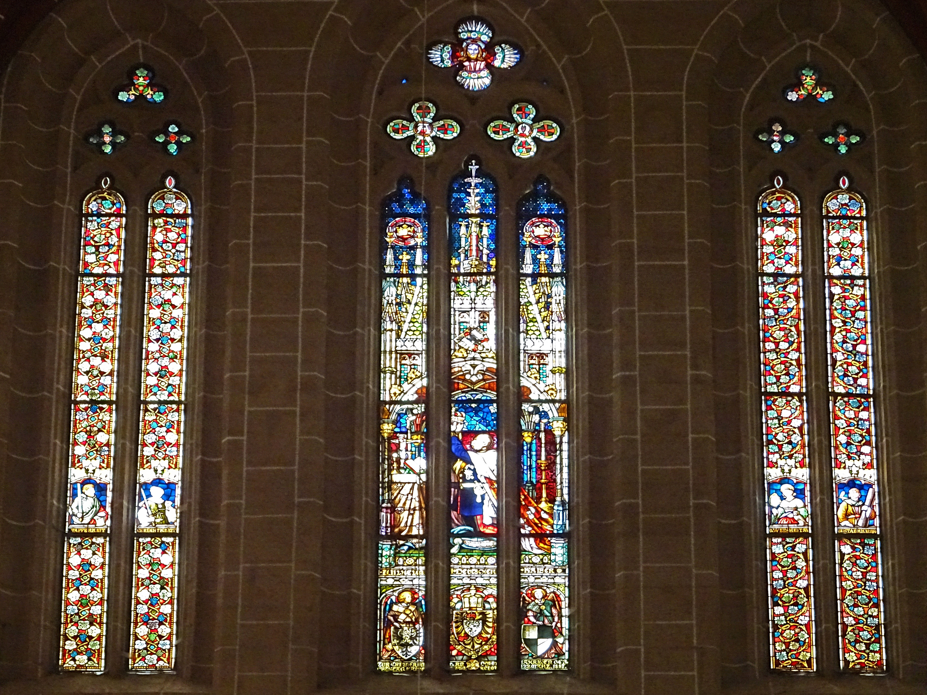 Buntglasfenster in der Marienkirche (Mühlhausen)